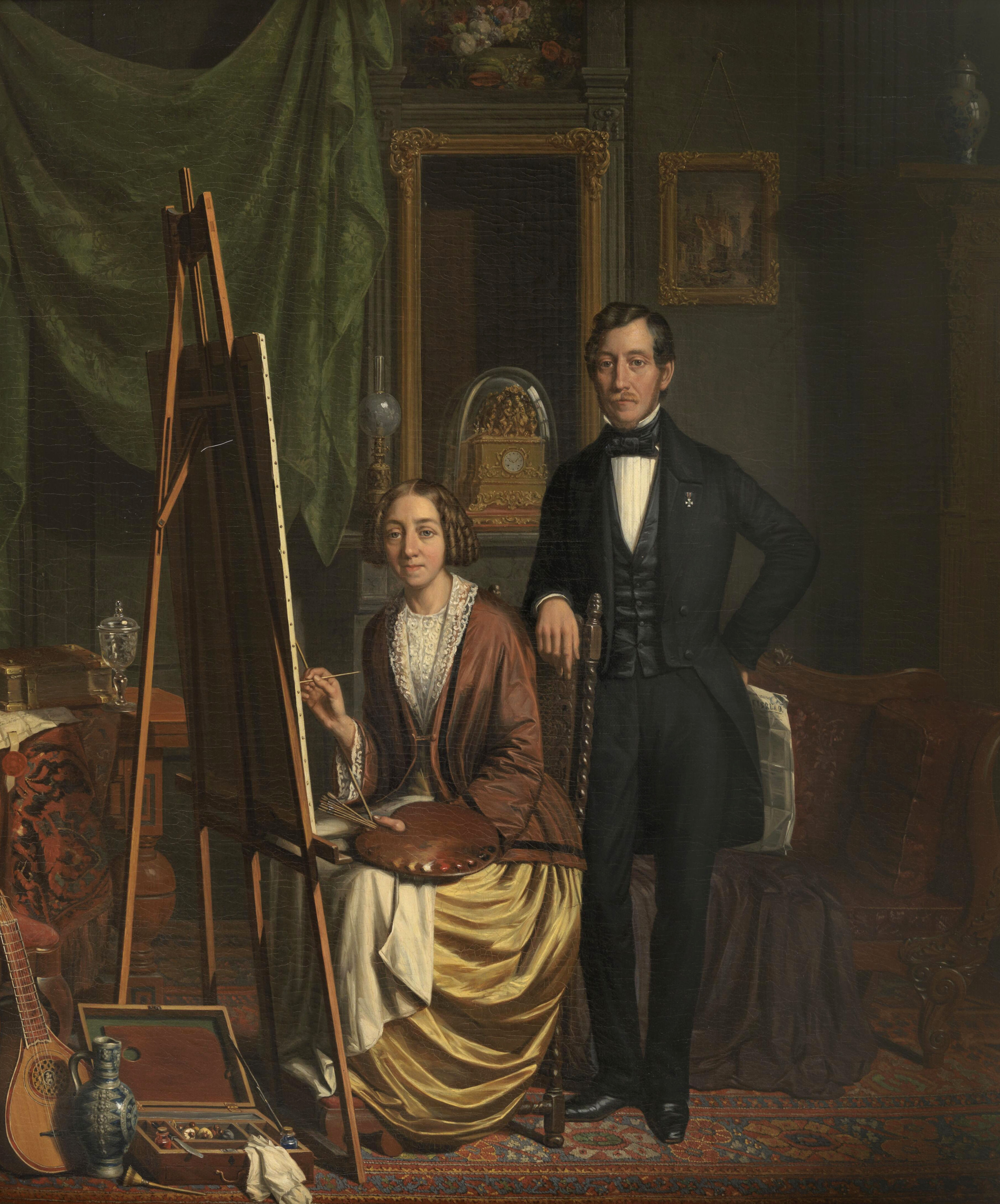 (Zelf)portret van het echtpaar Kiers-Haanen door Elizabeth Haanen (1845)